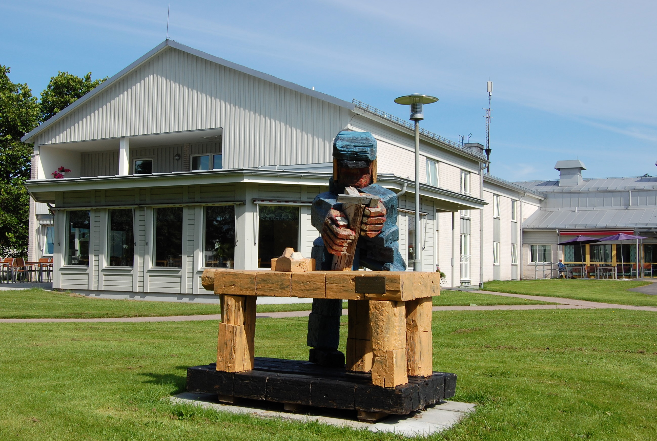 Figur in Stockaryd